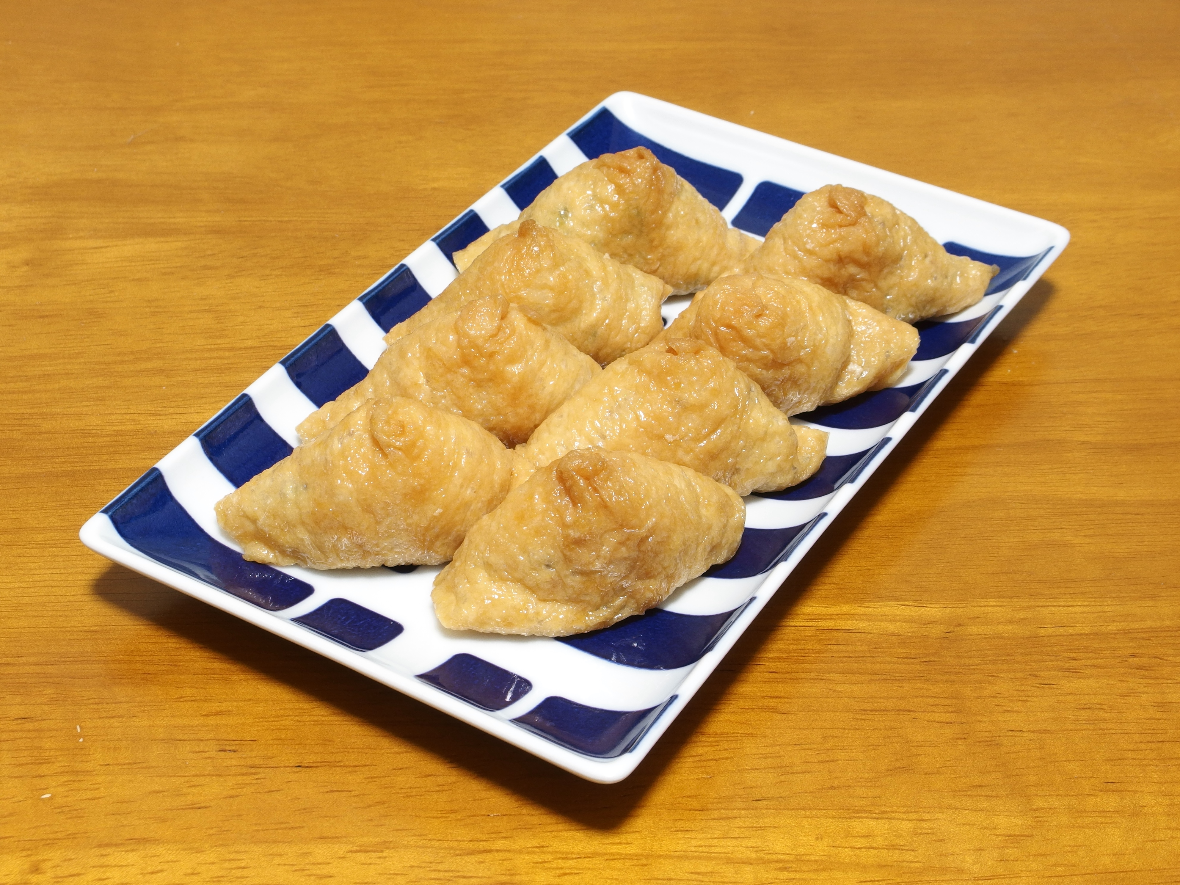 初午に食する関西風のいなり寿司。